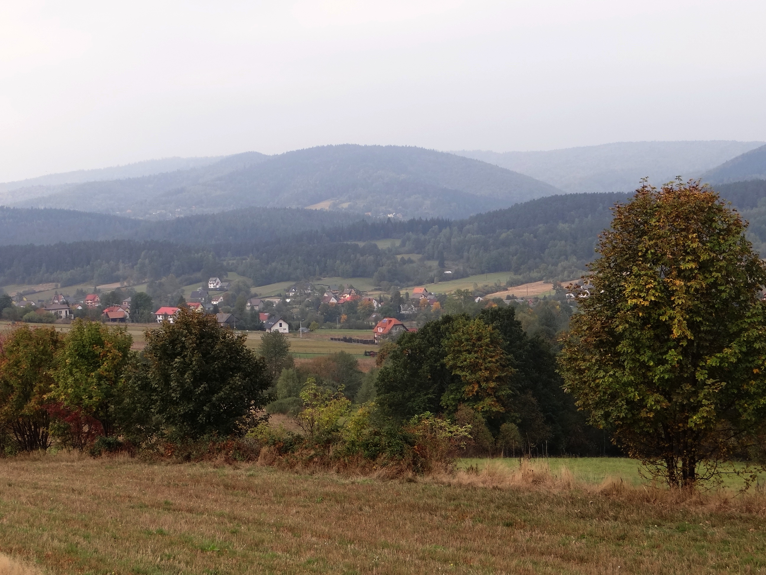 Gajka i Czarna Góra. Widok z południowo-wschodniej strony